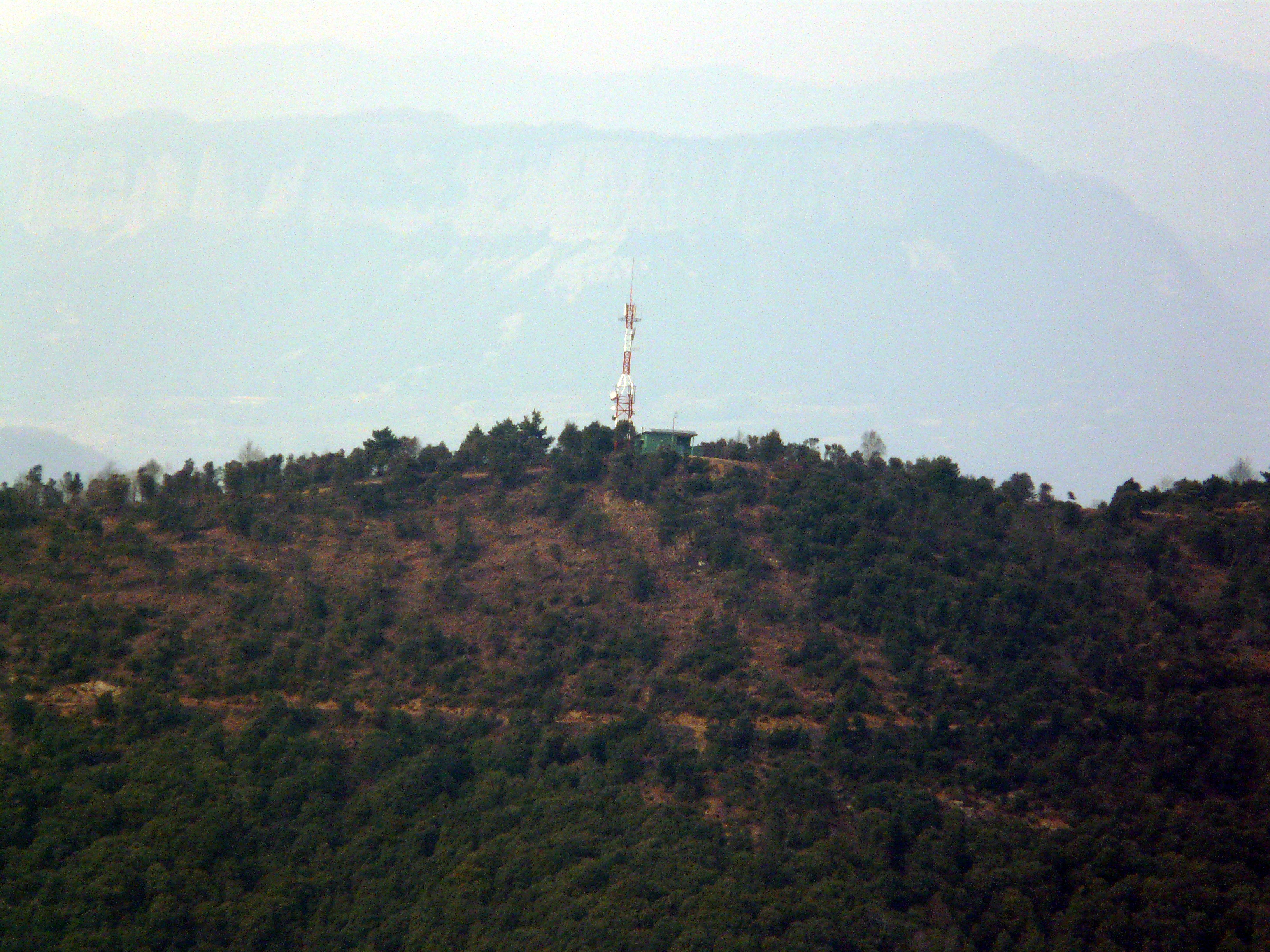 El cim del Sant Benet, vist de Sant Miquel de les Formigues